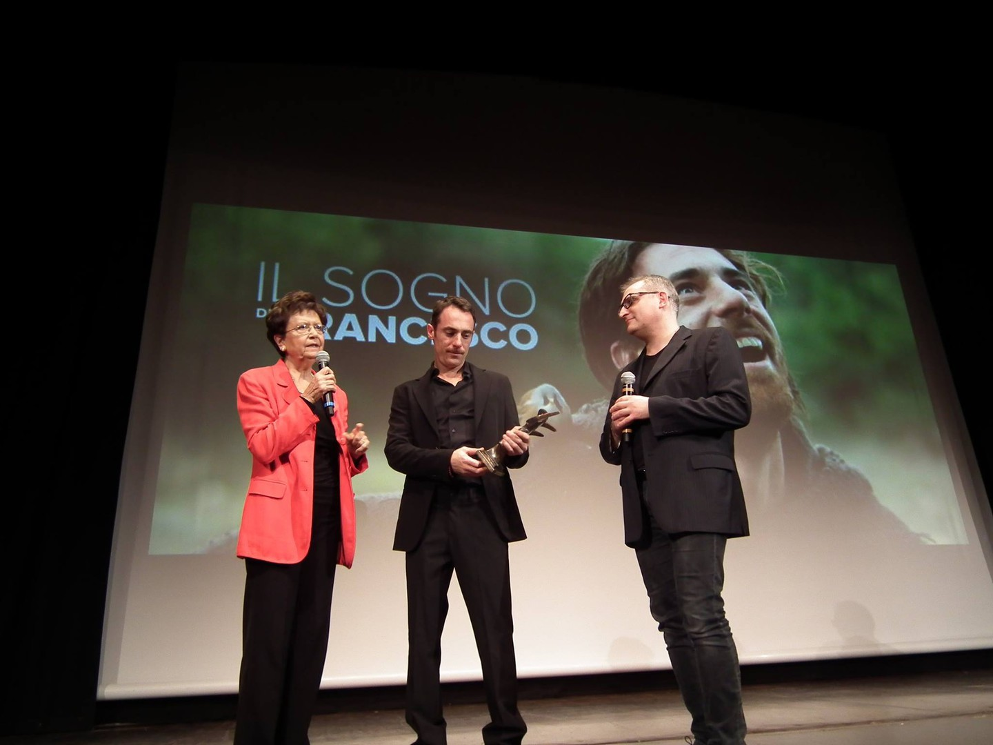 Popoli e Religioni - Terni Film Festival, Premio alla Carriera a Elio Germano